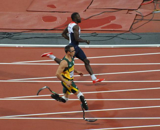 Oscar Pistorius in 400m semi